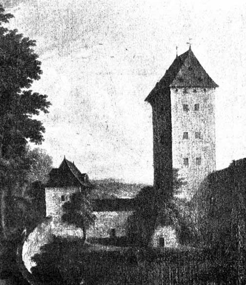 Sandkaultor - altes Stadttor in Aachen